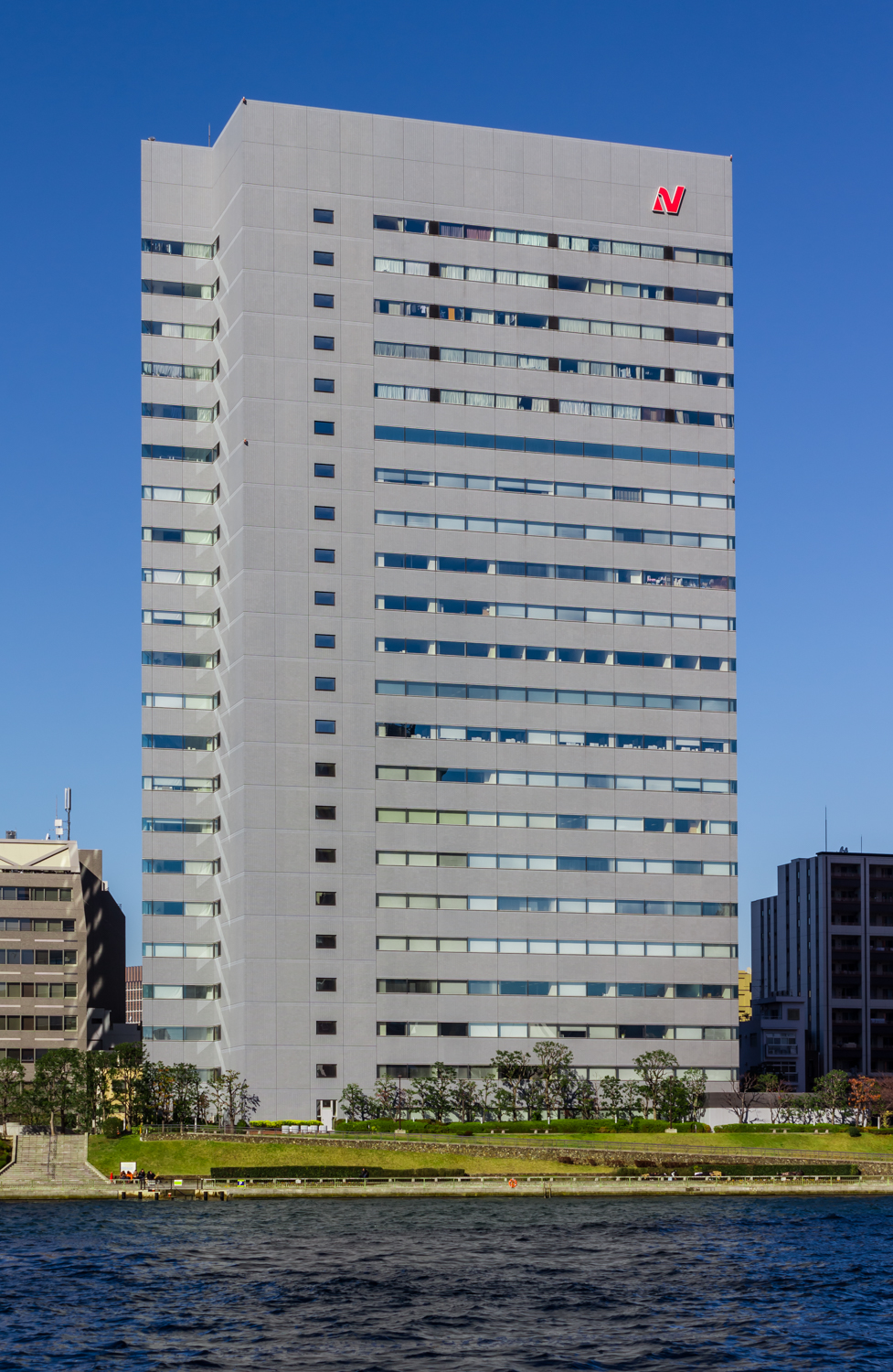 ニチレイ本社（東京都中央区）